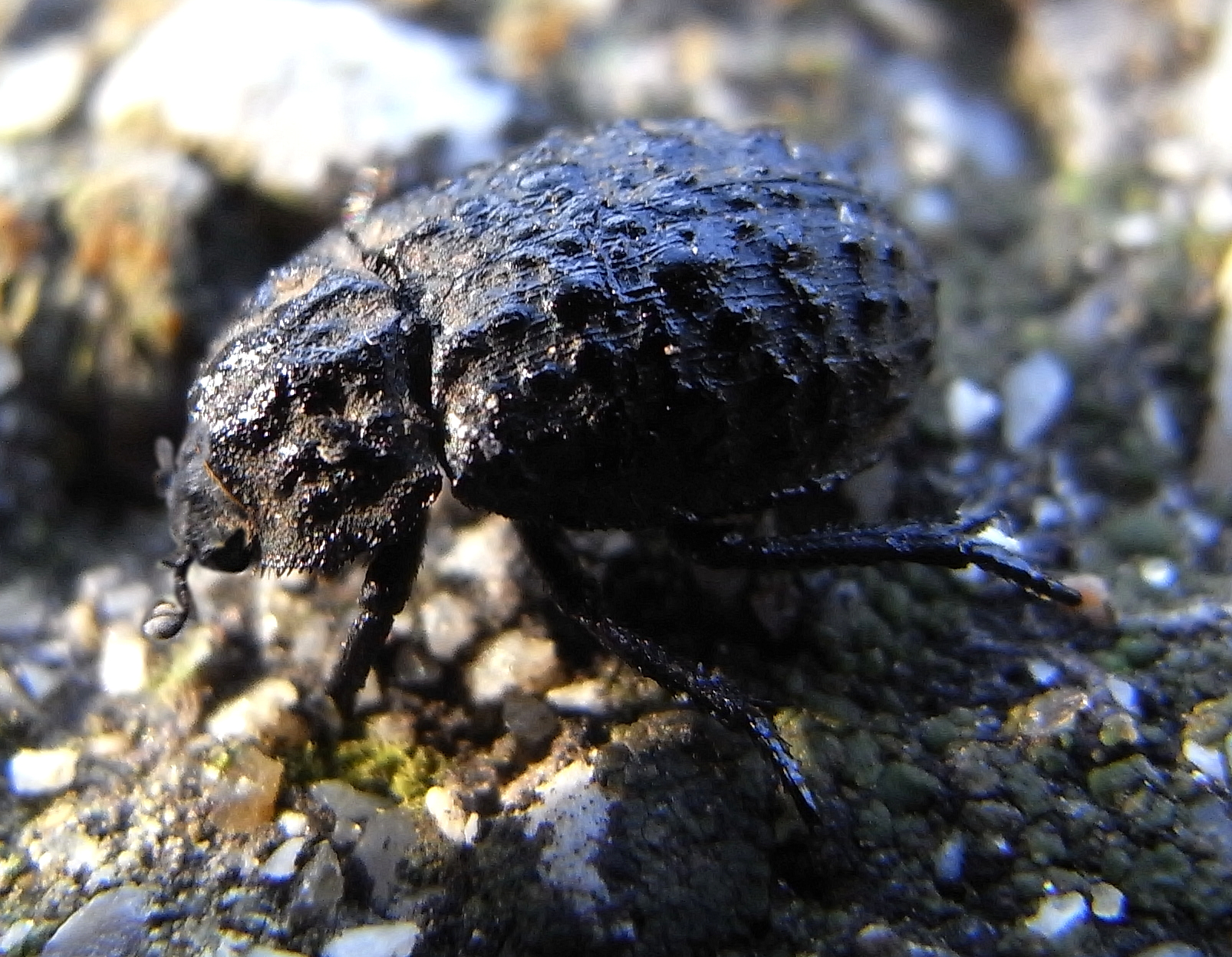 Trox perlatus Ricoh R8